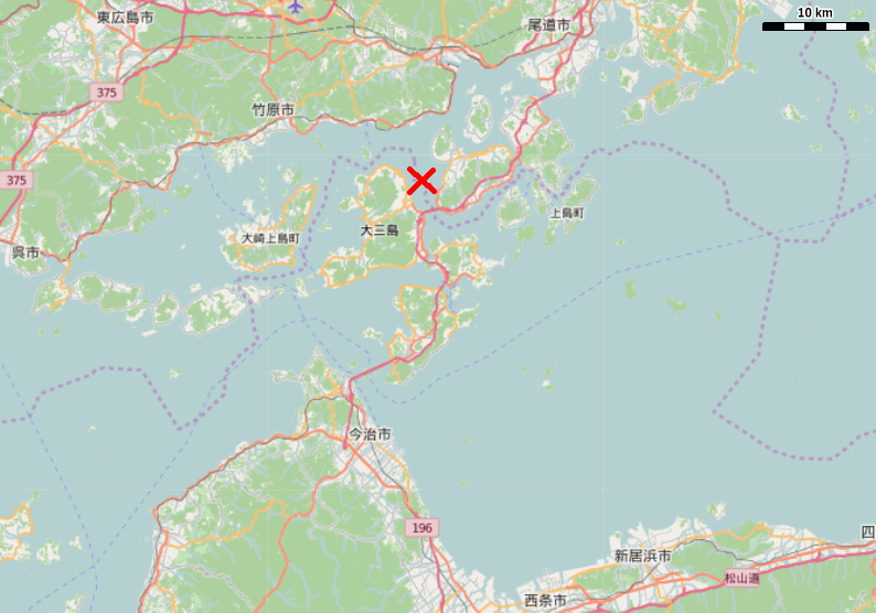 芸予諸島にある瓢箪島を示したもの This map may be incomplete, and may contain errors. Don't rely solely on it for navigation.